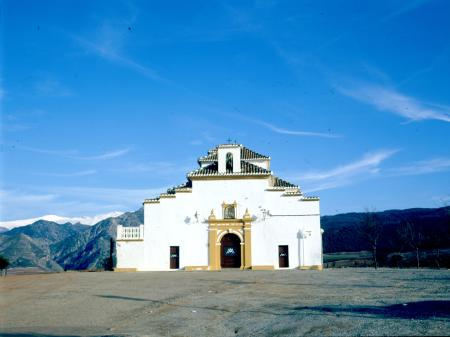 Ermita de la Virgen de las Nieves, en Dílar (Granada, España)